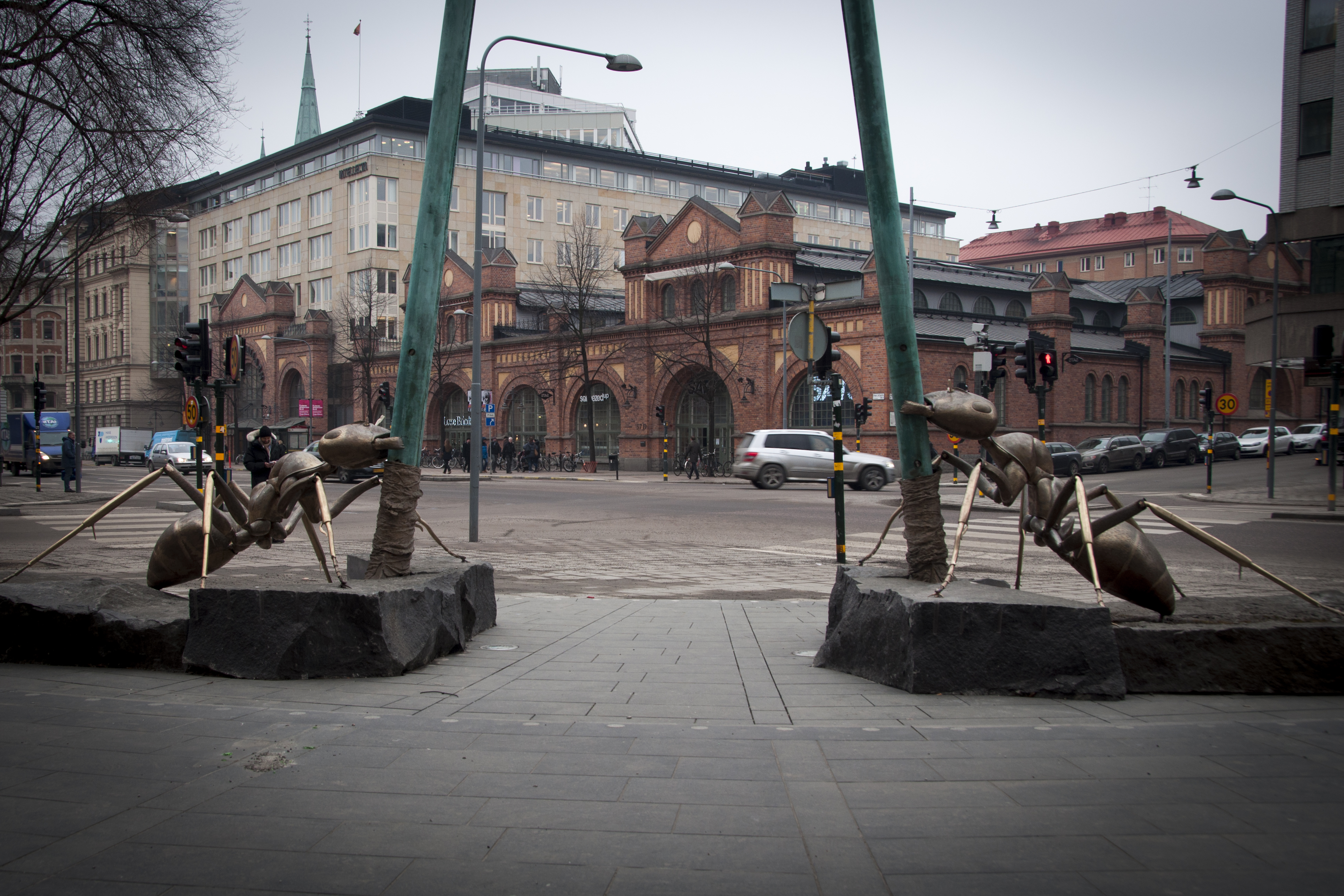 Skulpturen Två Myror, Torgny Larsson (2014)